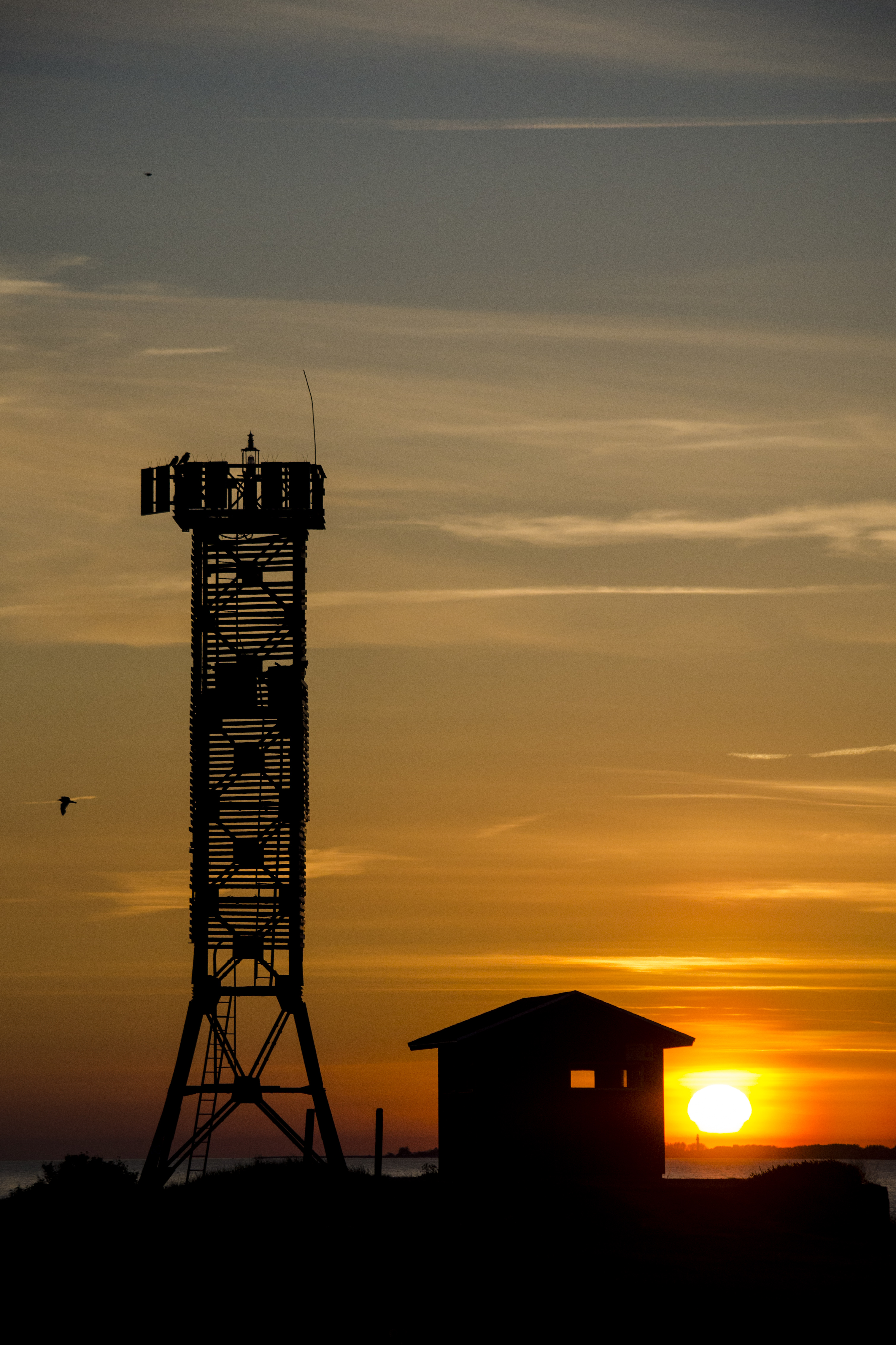 Loojang Põõsaspea neemel